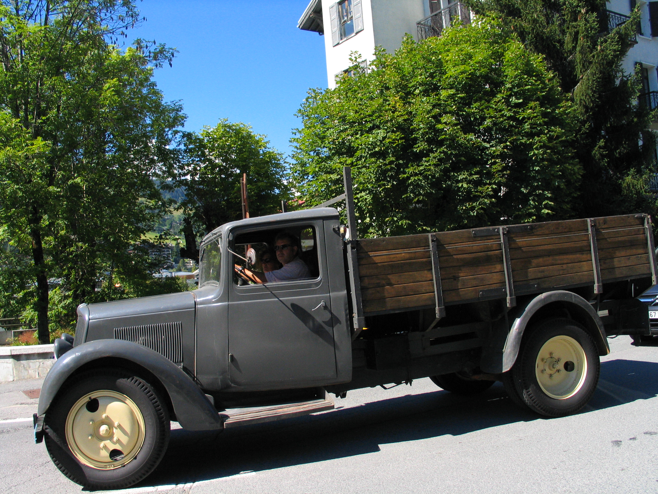 Ancien camion Citroën des années 1950, Megève, fête de l'été